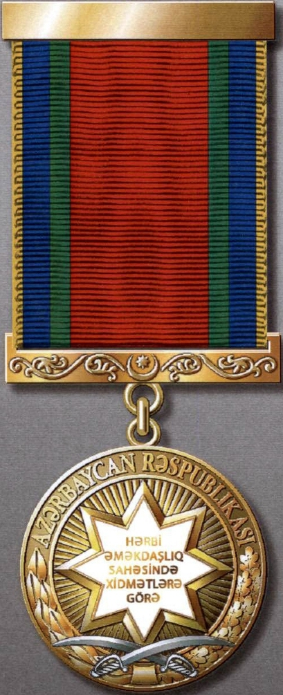 Azərbaycan Respublikasının “Hərbi əməkdaşlıq sahəsində xidmətlərə görə” medalı